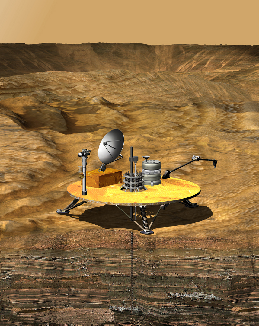 Denna bild kommer från NASA, källa [1]